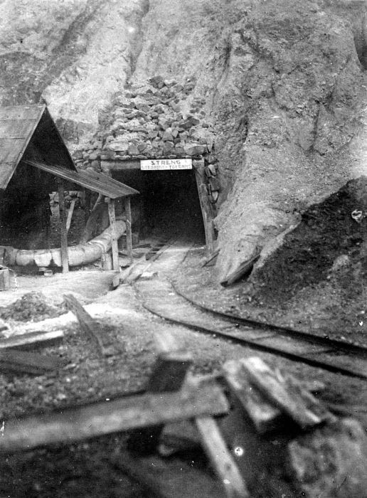 Repronegatief. Tunnel in de Keloed